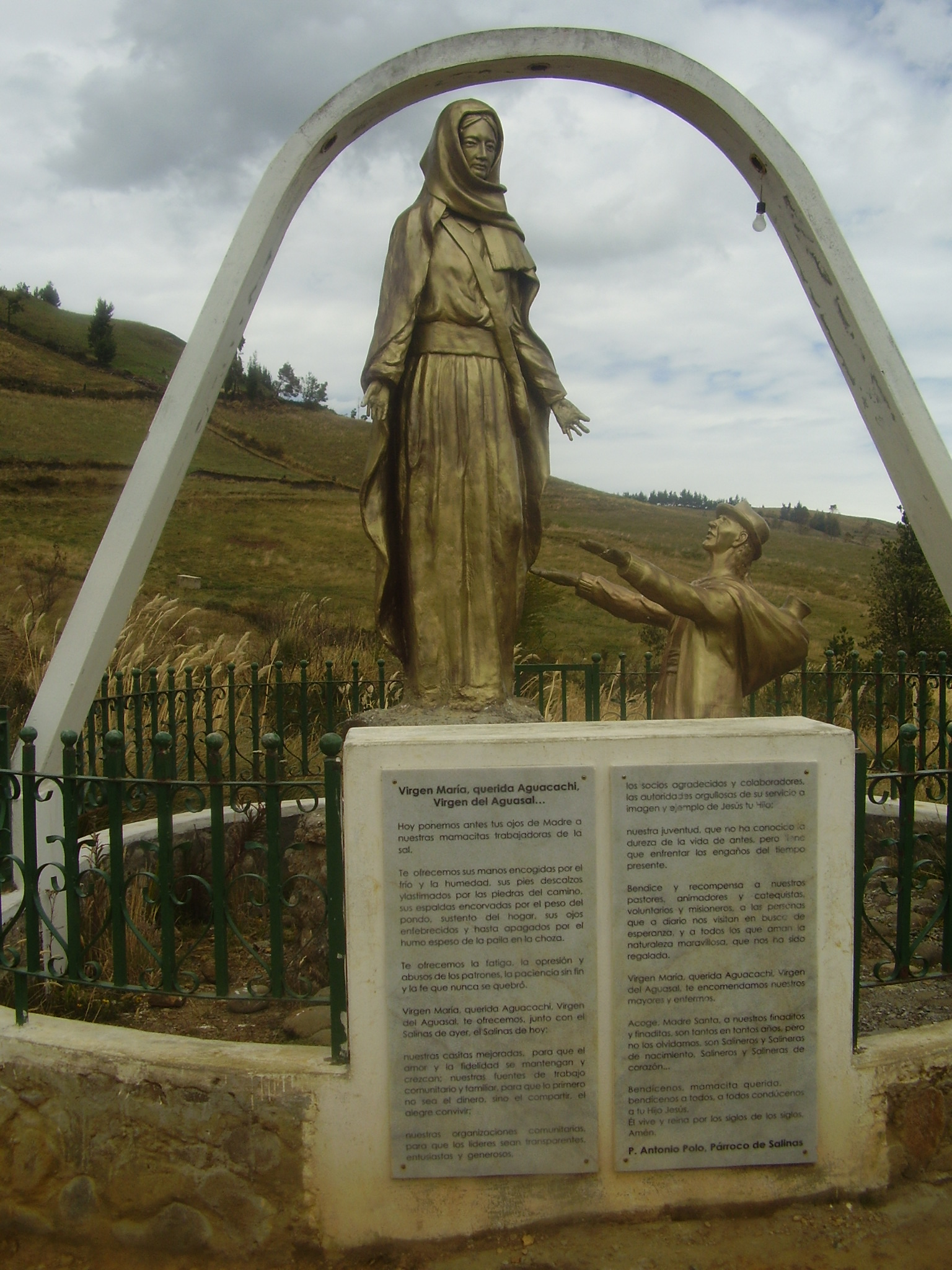 Questa statua è stata dedicata dai lavoratori della salina di Salinas de Guaranda alla Madonna in seguito all'apparizione miracolosa di essa ad uno di loro